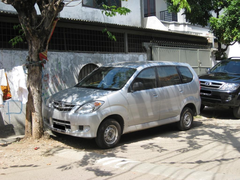 2009 Daihatsu Xenia 1.0 Li